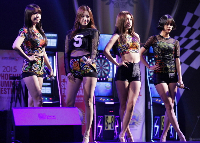 걸스데이(Girl's Day) 2015 피닉스 섬머 페스티벌 일산 킨텍스